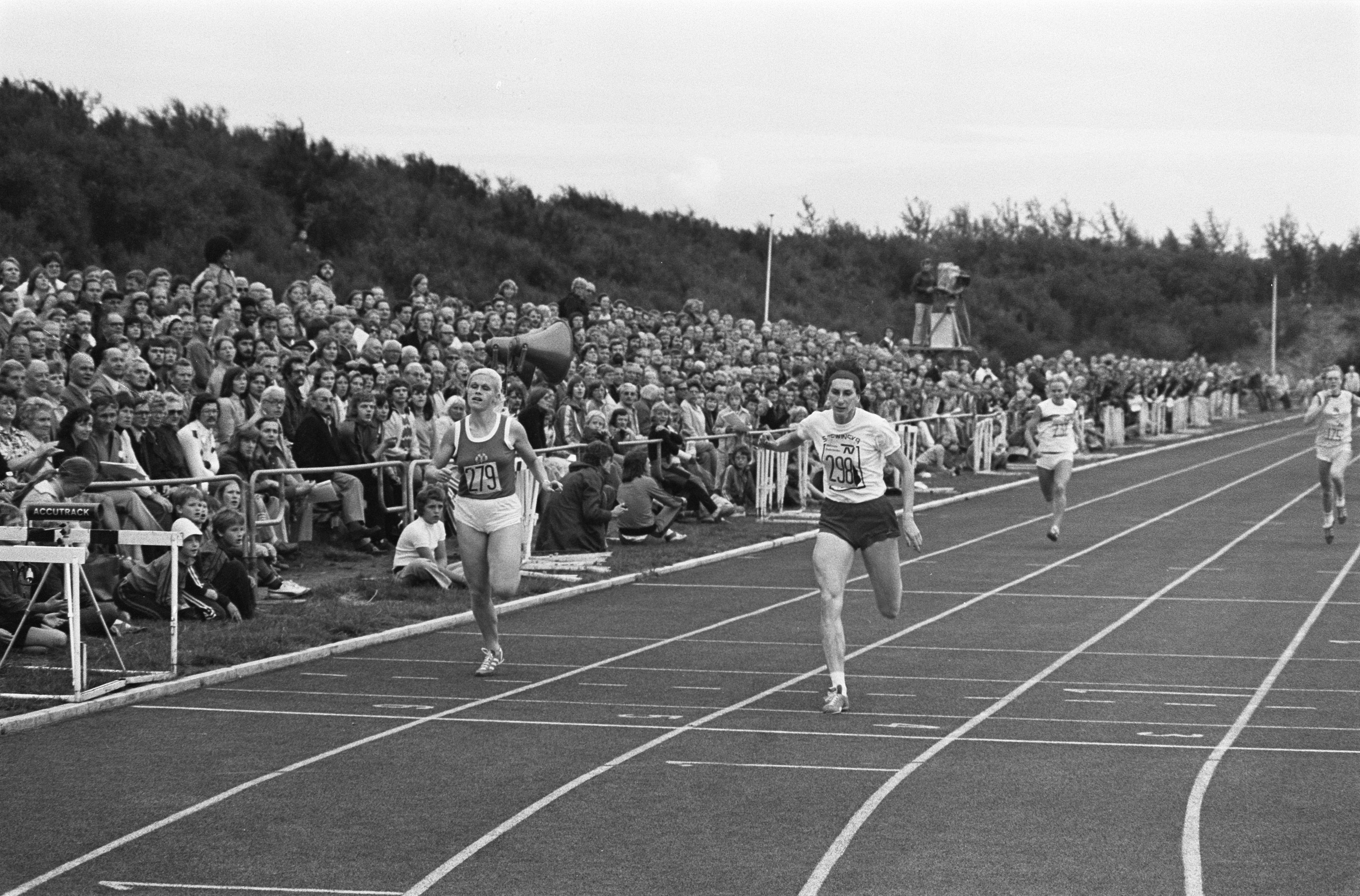 Collectie / Archief : Fotocollectie Anefo Reportage / Serie : Internationale atletiekwedstrijden op Papendal in 1975 Beschrijving : Irena Szewinska (Polen) wint 200 meter (rechts) voor Karla Bodendorff (DDR) Datum : 16 juli 1975 Locatie : Arnhem, Gelderland, Papendal Trefwoorden : atletiek, hardlopen, sport, toernooien Persoonsnaam : Bodendorff, Karla, Szewiñska, Irena Instellingsnaam : Papendal Fotograaf : Bert Verhoeff / Anefo Auteursrechthebbende : Nationaal Archief Materiaalsoort : Negatief (zwart/wit) Nummer archiefinventaris : bekijk toegang 2.24.01.05 Bestanddeelnummer : 928-0516